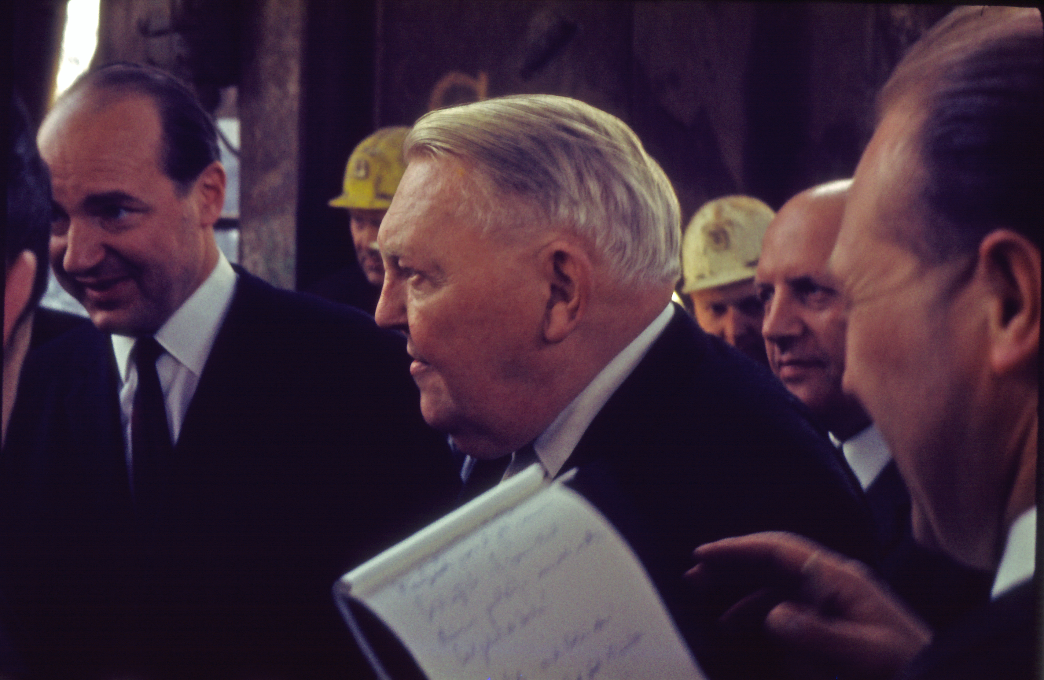 Bundeskanzler Ludwig Erhard am 2. April 1965 beim Besuch der Zeche Friedrich der Große, Schacht 6, in Herne